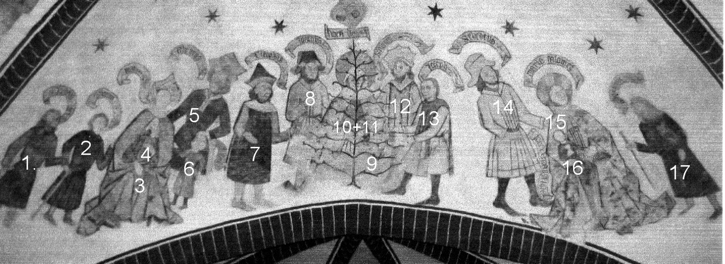 Personenbeschreibung Hl.Sippe, Loxstedt, 15.Jhdt Kalkmalerei: 1.Simon Zelotes, 2.Judas Thaddäus, 3.Maria Cleophas, 4.Joseph, 5. Alphäus, 6. Jacobus minor, 7. Cleophas, 8. Joachim, 9.Anna, 10. Jesus, 11. Maria, 12. Salomas, 13.Joseph, 14.Zebedäus, 15.Maria Salome, 16. Johannes Ev. 17.Jacobus major